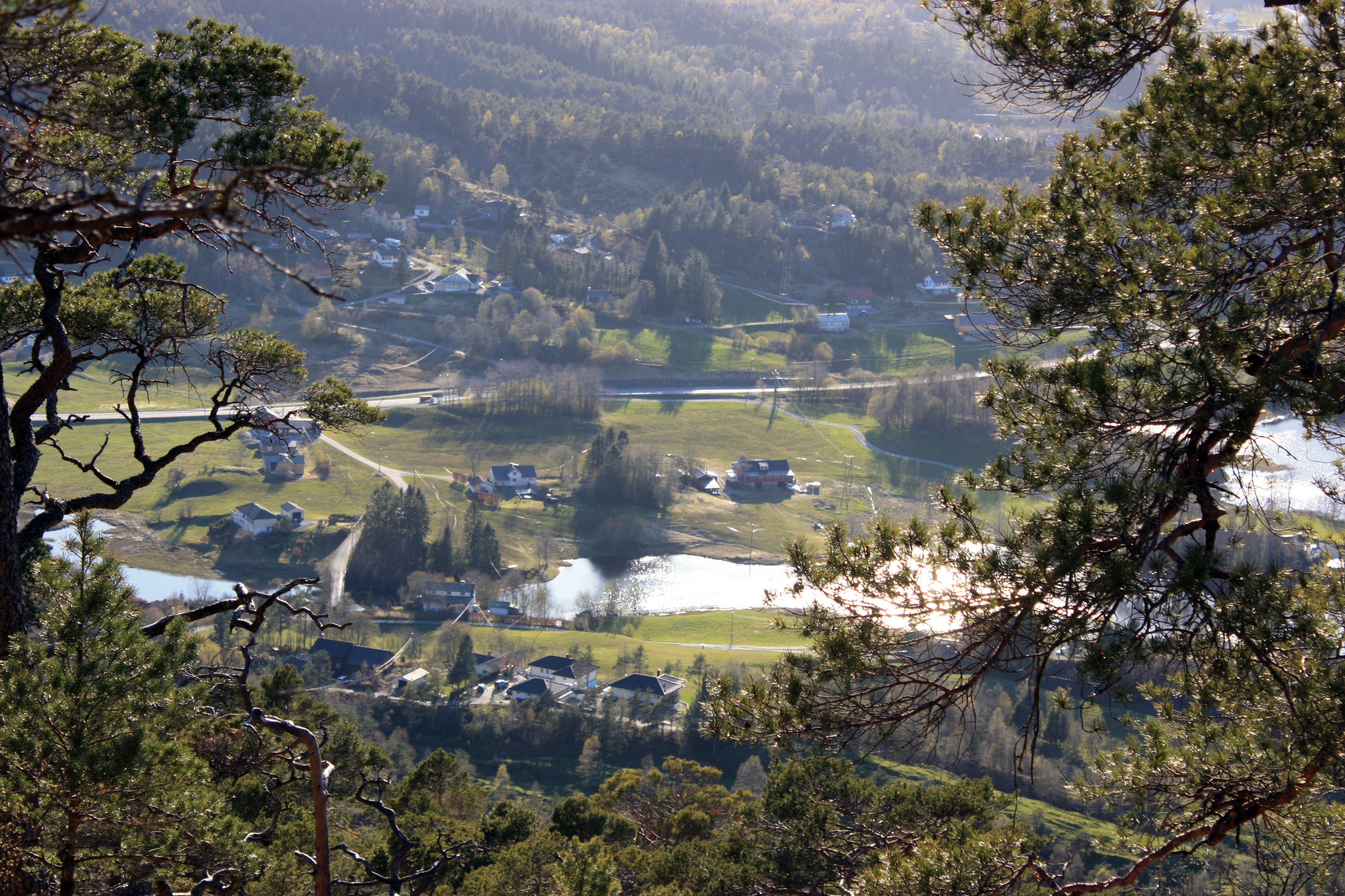 Bahus, Fana, Bergen, Norway